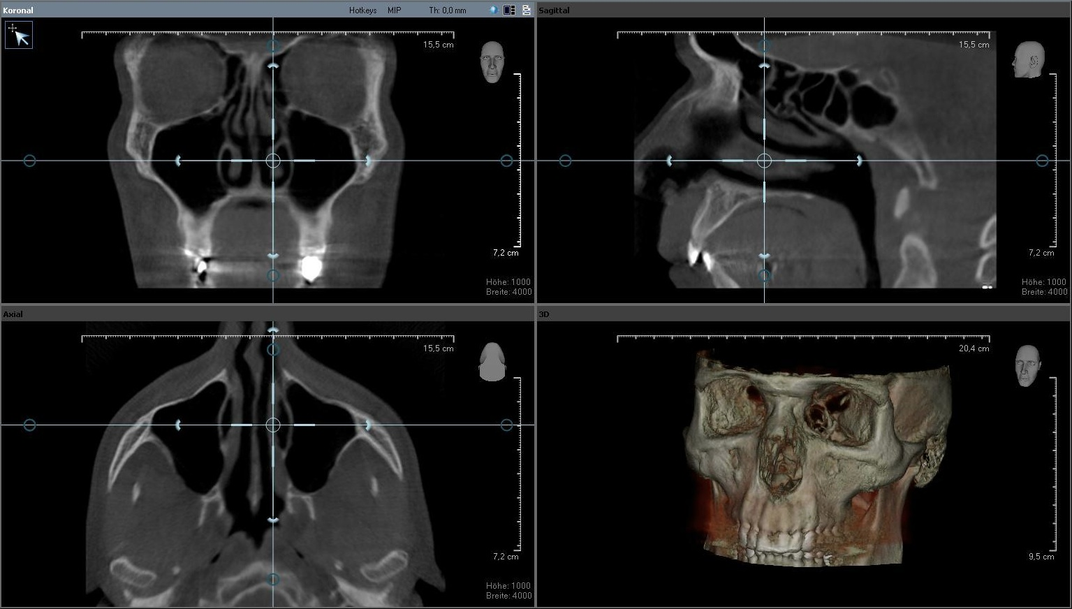 Darstellung aller drei Raumebenen im CBCT